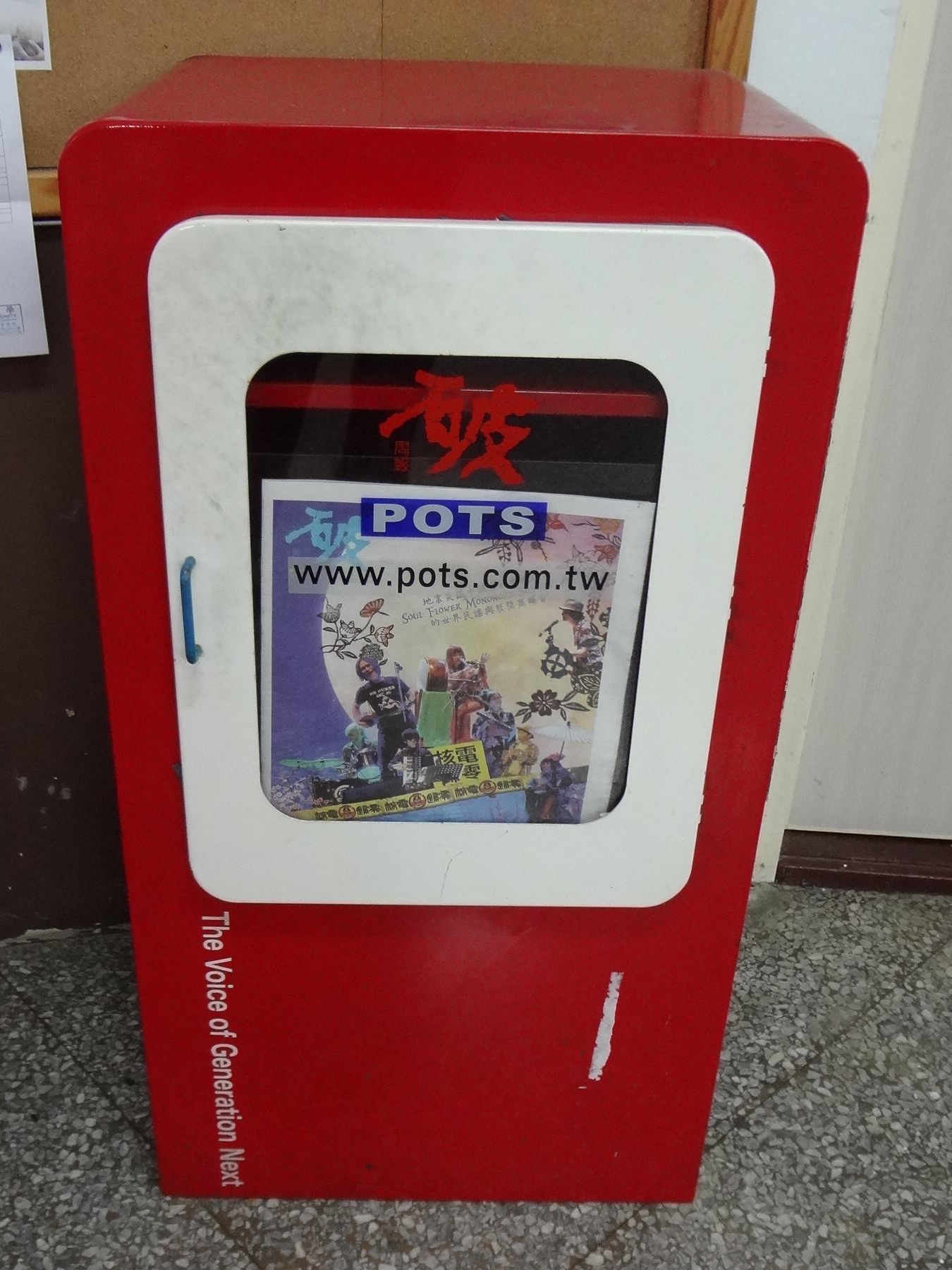 中文（台灣）: 東吳大學外雙溪校區哲生樓走廊設置的《破報》專用箱。